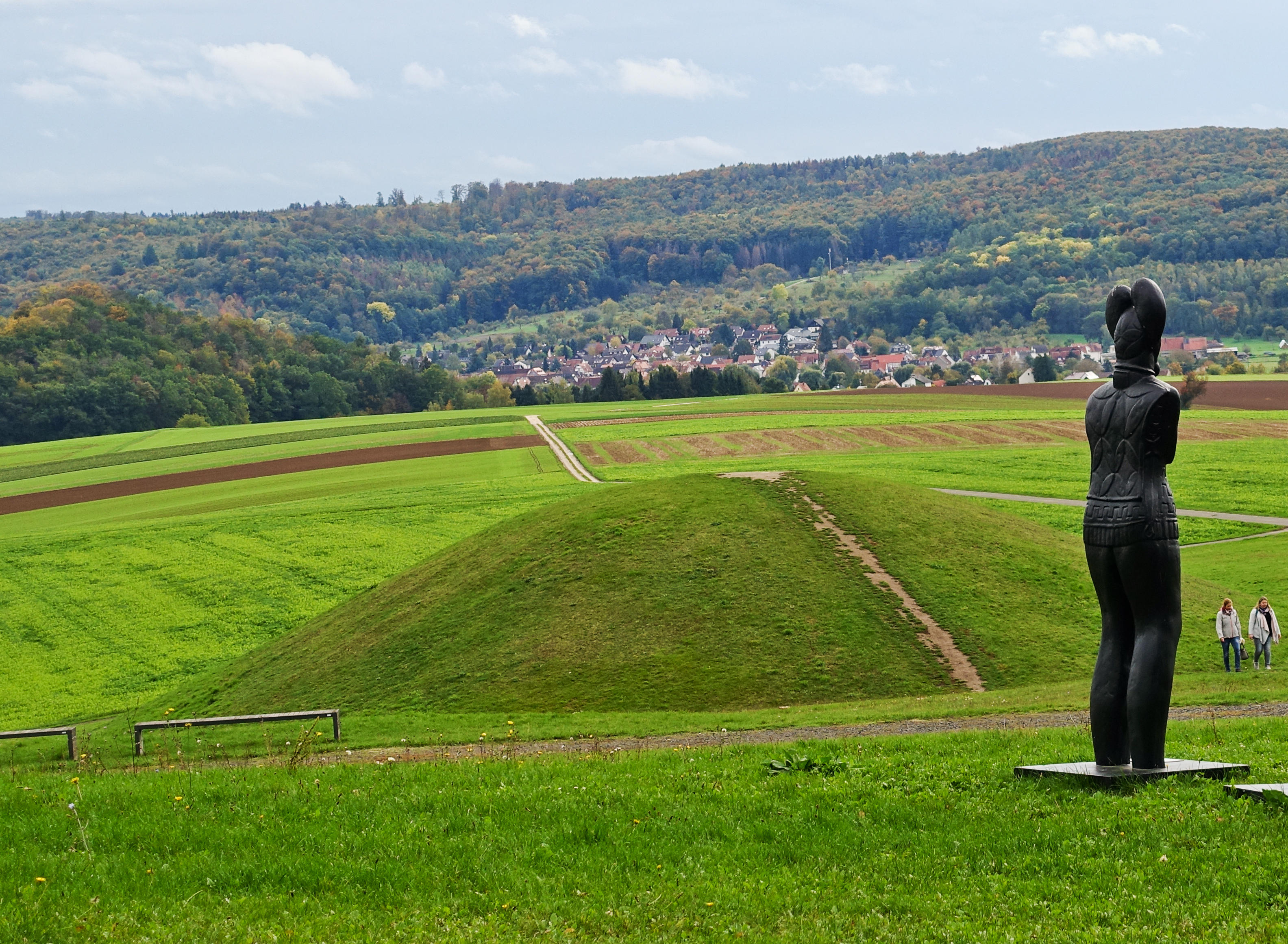 Rekonstruierter keltischer Grabhügel am Glauberg (Hessen) mit rekonstruierter Stele des Keltenfürsten